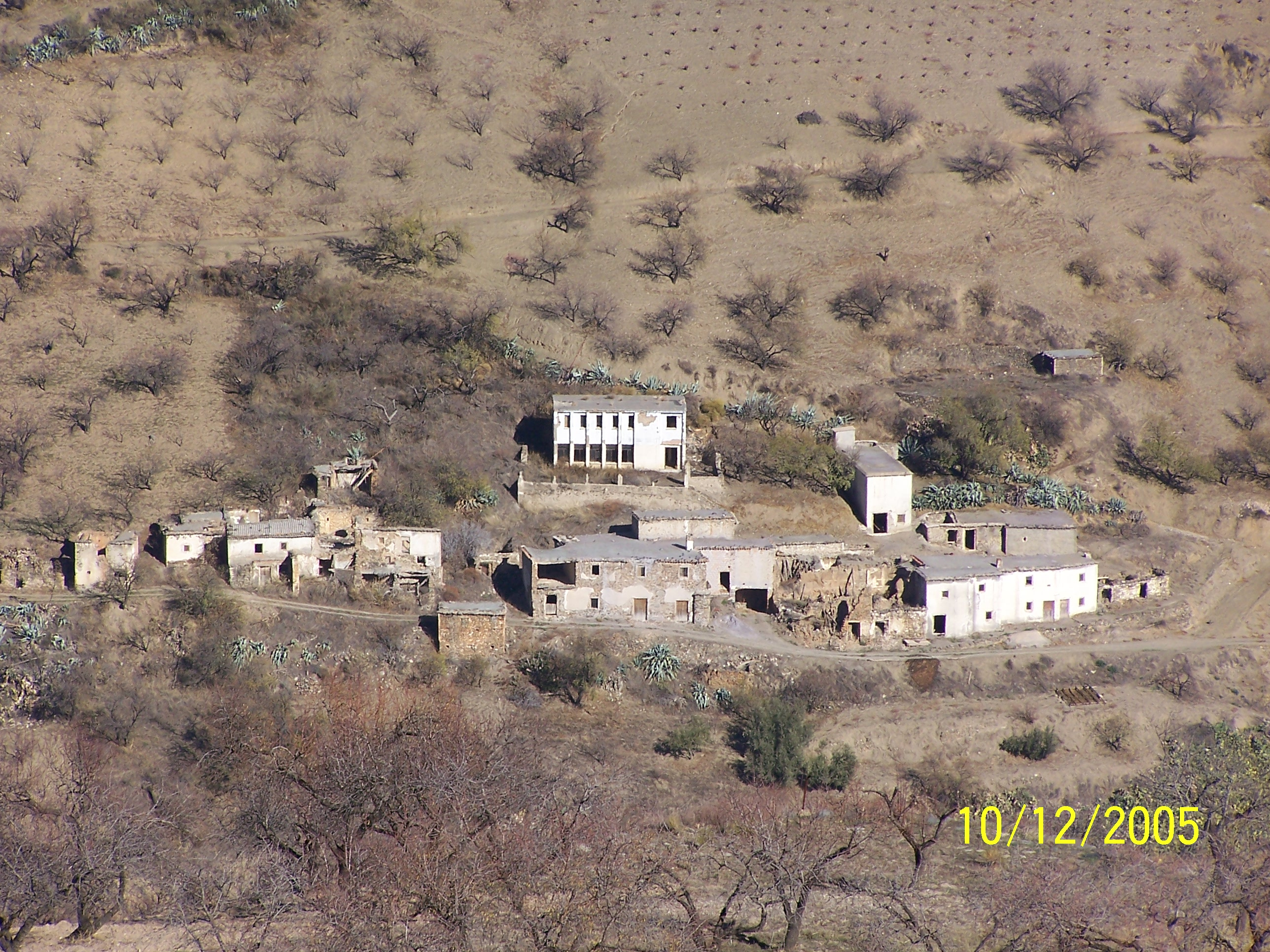 Cortijada abandonada en Almegíjar, en la Contraviesa